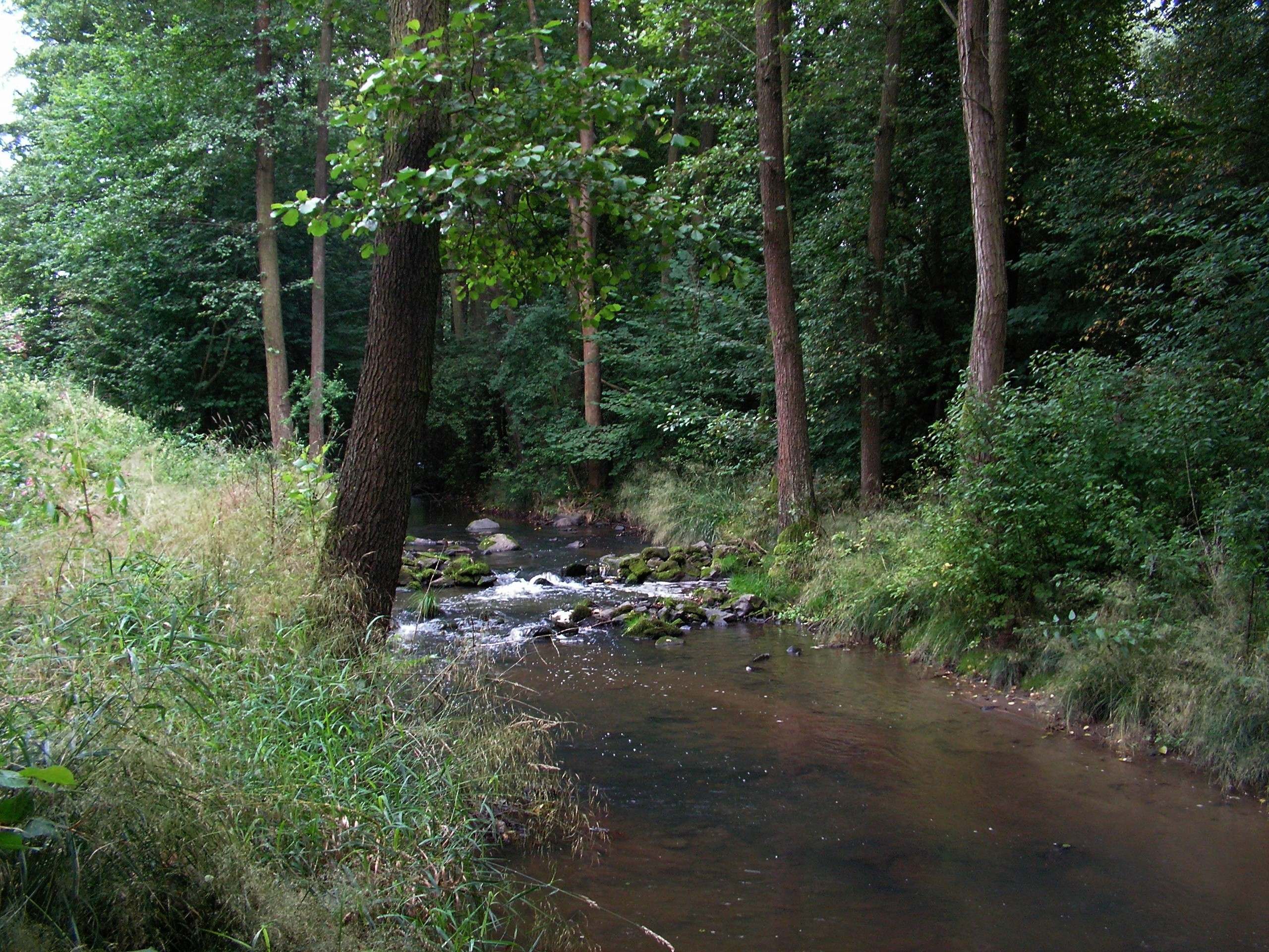 Janovický potok u Krusičan nad soutokem s Tloskovským potokem